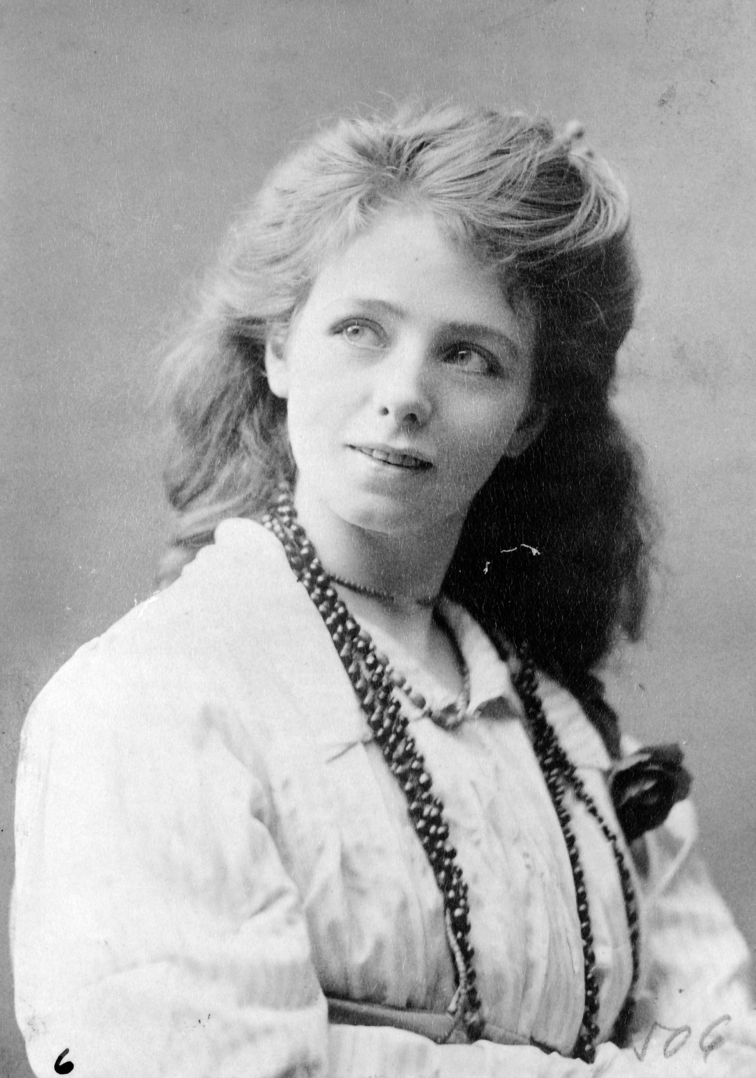 Actress Maude Adams